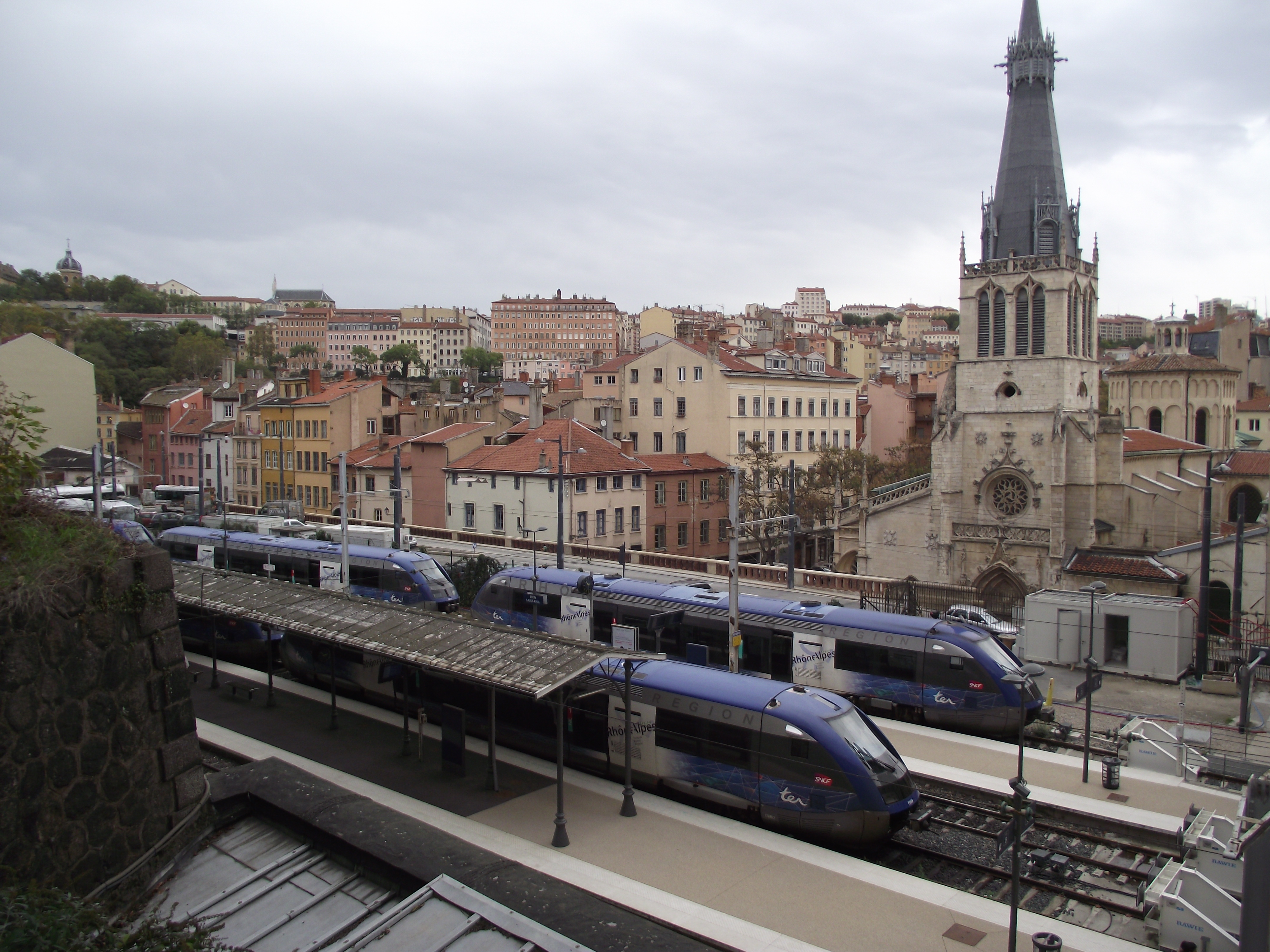 Station Lyon Saint-Paul van bovenaf gezien met X 73500 autorails